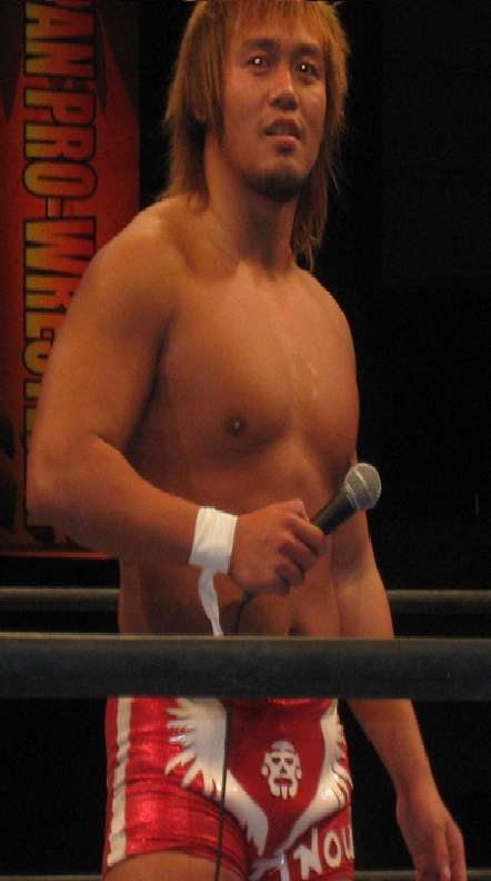 新日本プロレス 大阪大会